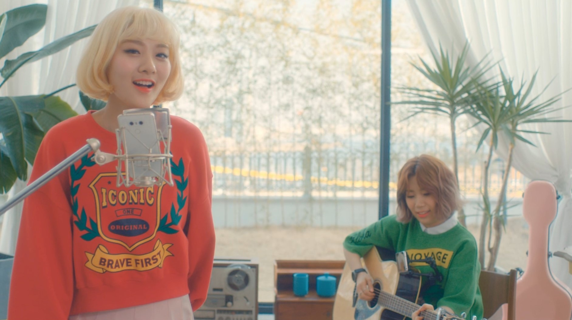 ■ 11일 유명 아티스트들이 ‘LG G6’로 직접 제작한 음원 2종 공개 □ ‘볼빨간 사춘기’의 어쿠스틱, ‘크러쉬’의 힙합 등 상반된 장르 선보여 □ ‘하이파이 레코딩’, ‘스튜디오 모드’ 등 활용 ■ 고객들이 ‘LG G6’의 고성능 오디오 기술 체험할 할 수 있는 다양한 이벤트 마련 □ 공개된 영상 감상하고 추천 및 감상평 남기면 추첨으로 ‘LG G6’등 경품 증정 □ 고객이 공개된 음원을 활용, 나만의 노래를 제작하는 이벤트 진행 ■ LG전자 한국모바일그룹 이상규 전무 “G6만의 차별화된 멀티미디어 기능을 소비자가 직접 체험할 수 있는 다양한 마케팅 활동 전개해 갈 것” 강조 ※ Social LG전자 ( 에서 관련 보도자료를 확인하실 수 있습니다.